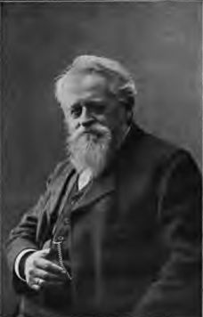 Siegmund Günther (1848–1923), German geographist